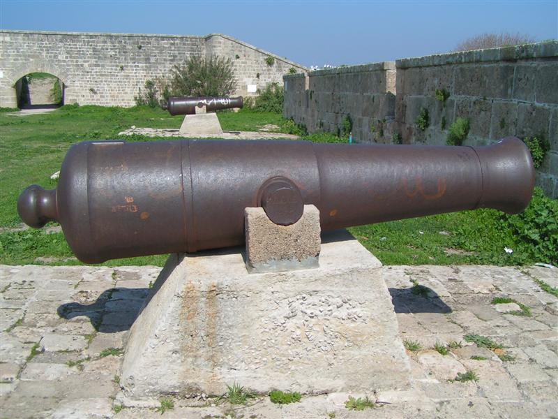 Acre